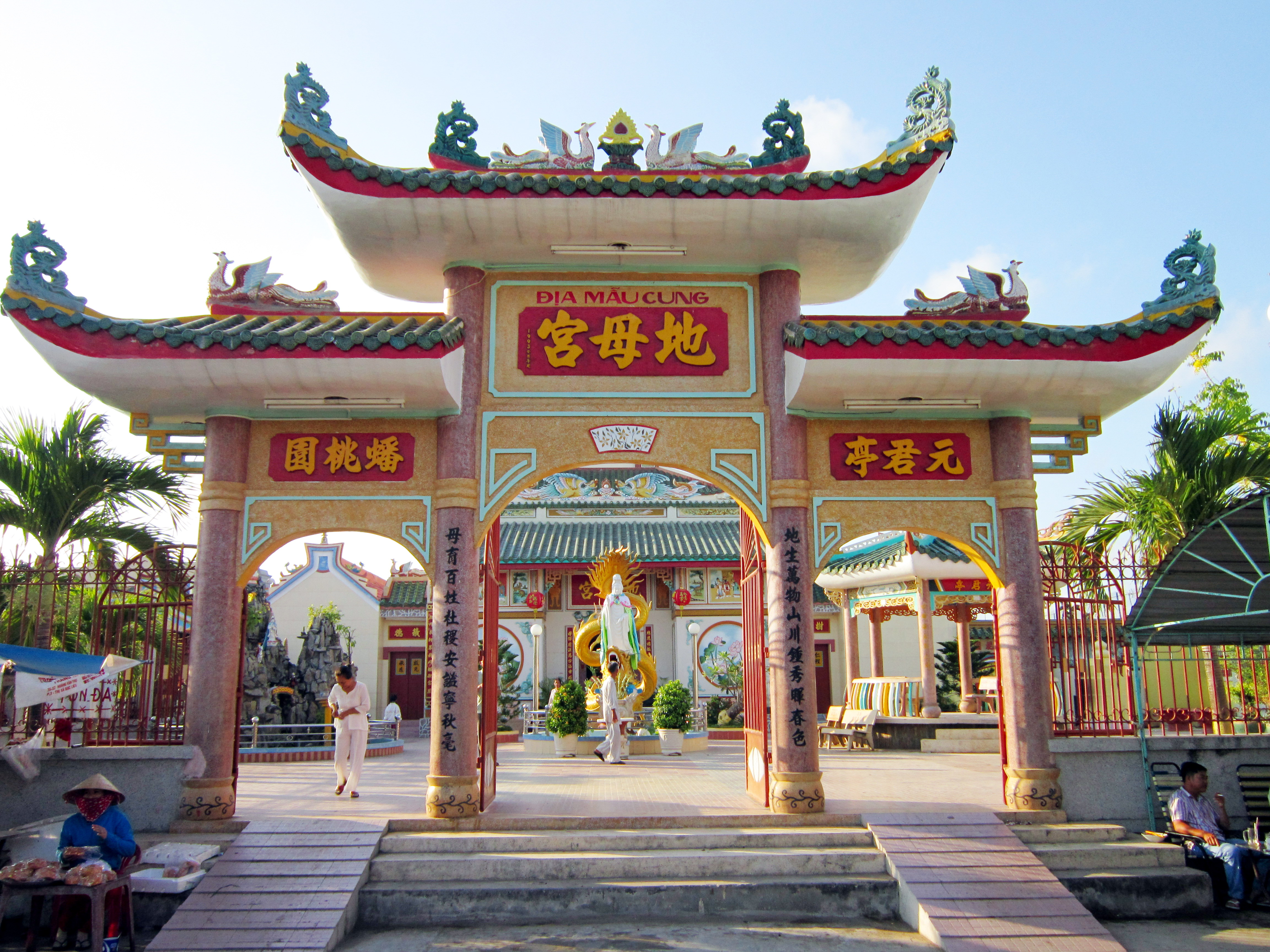 Địa Mẫu Cung là một ngôi miếu của người Việt gốc Hoa ở thành phố Bạc Liêu (Việt Nam).